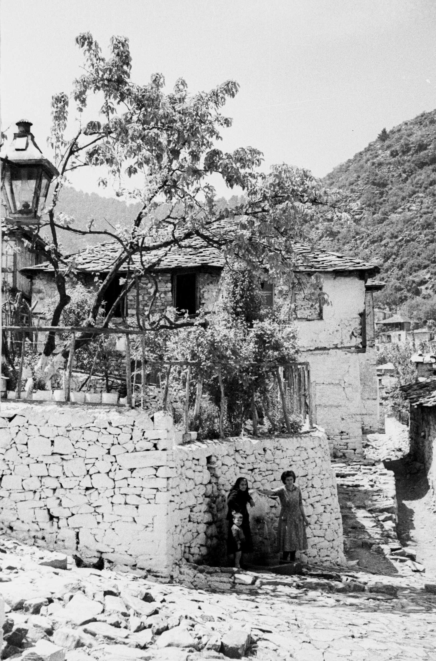 Oberdorf Panagia (1958)